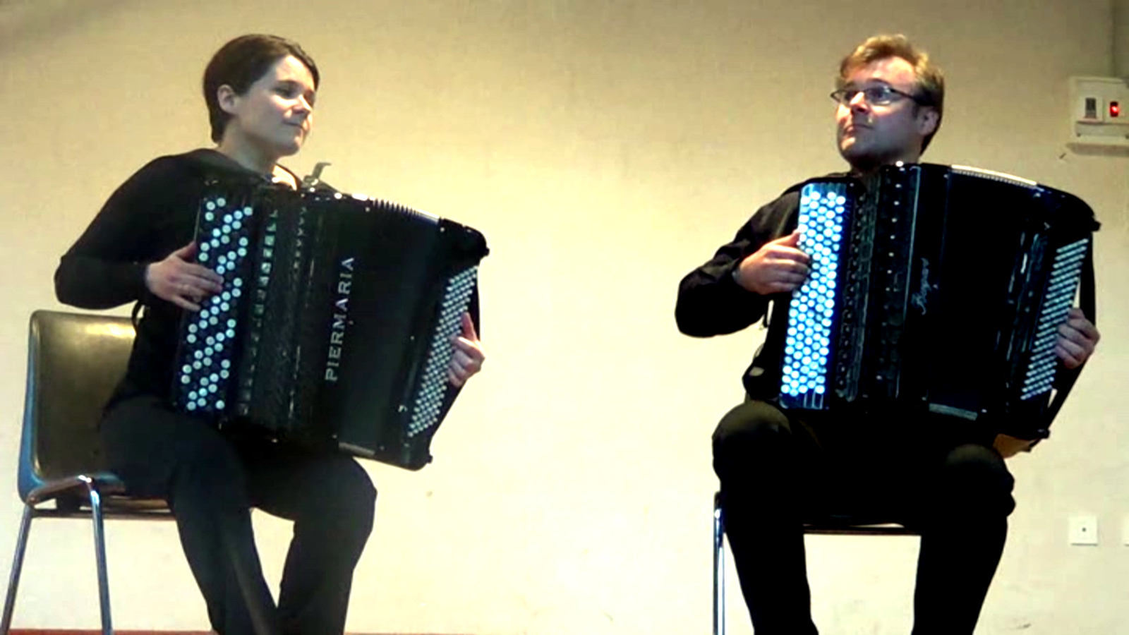 Le Duo lors du concert du 24 mai 2014 à Saint-Julien-Puy-Laveze